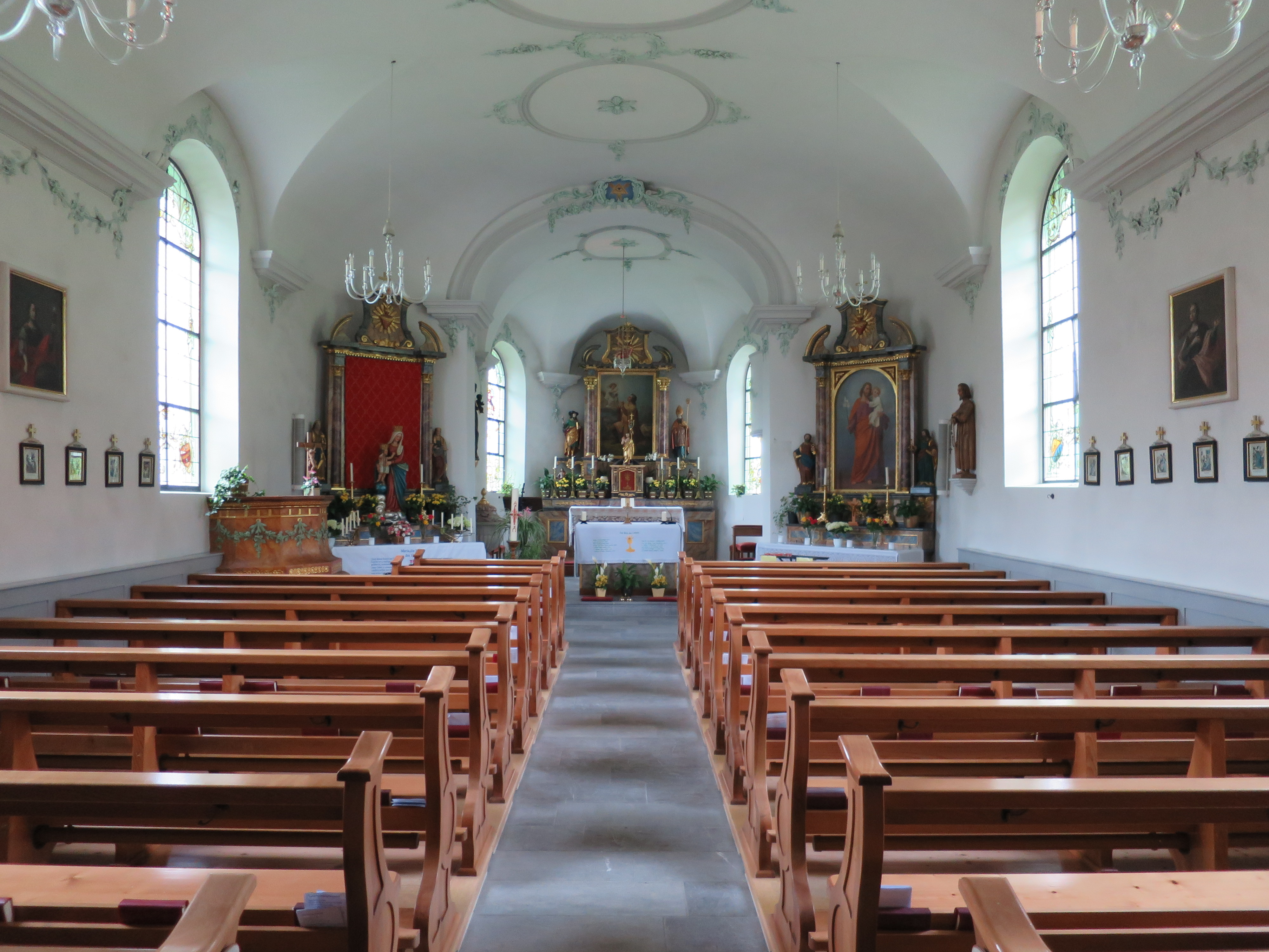 Kapelle Studen